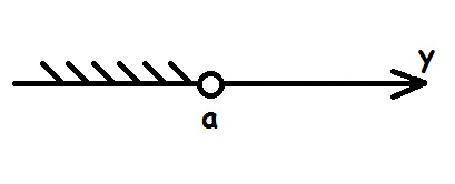 y ir mazāks nekā a